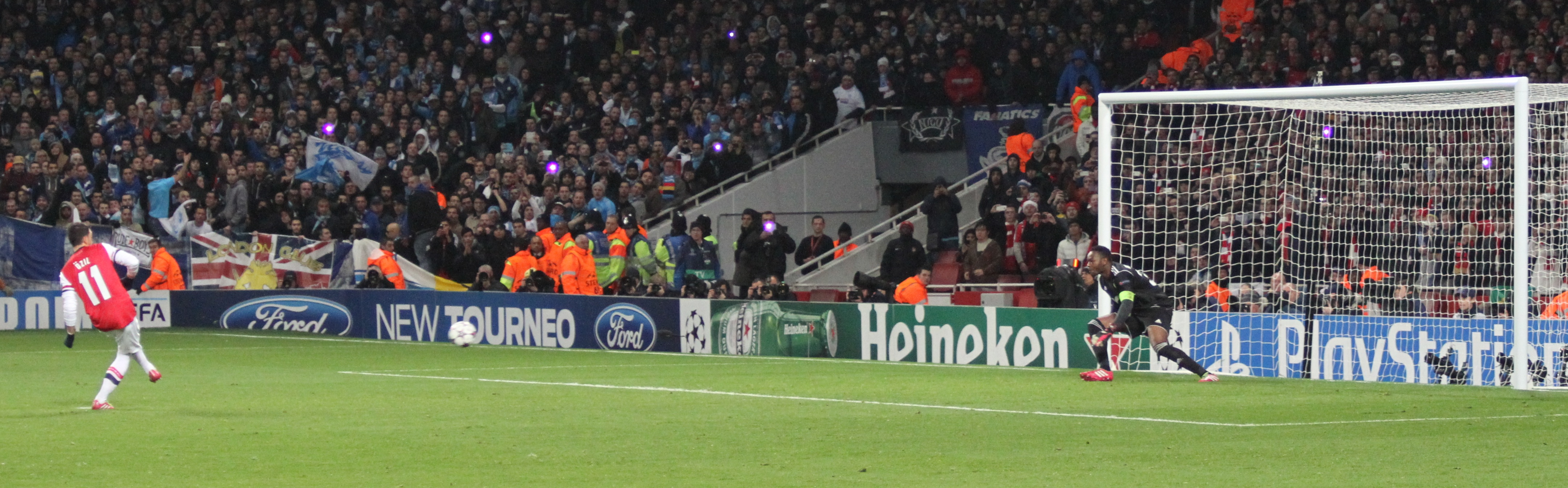 Özil penalty -1